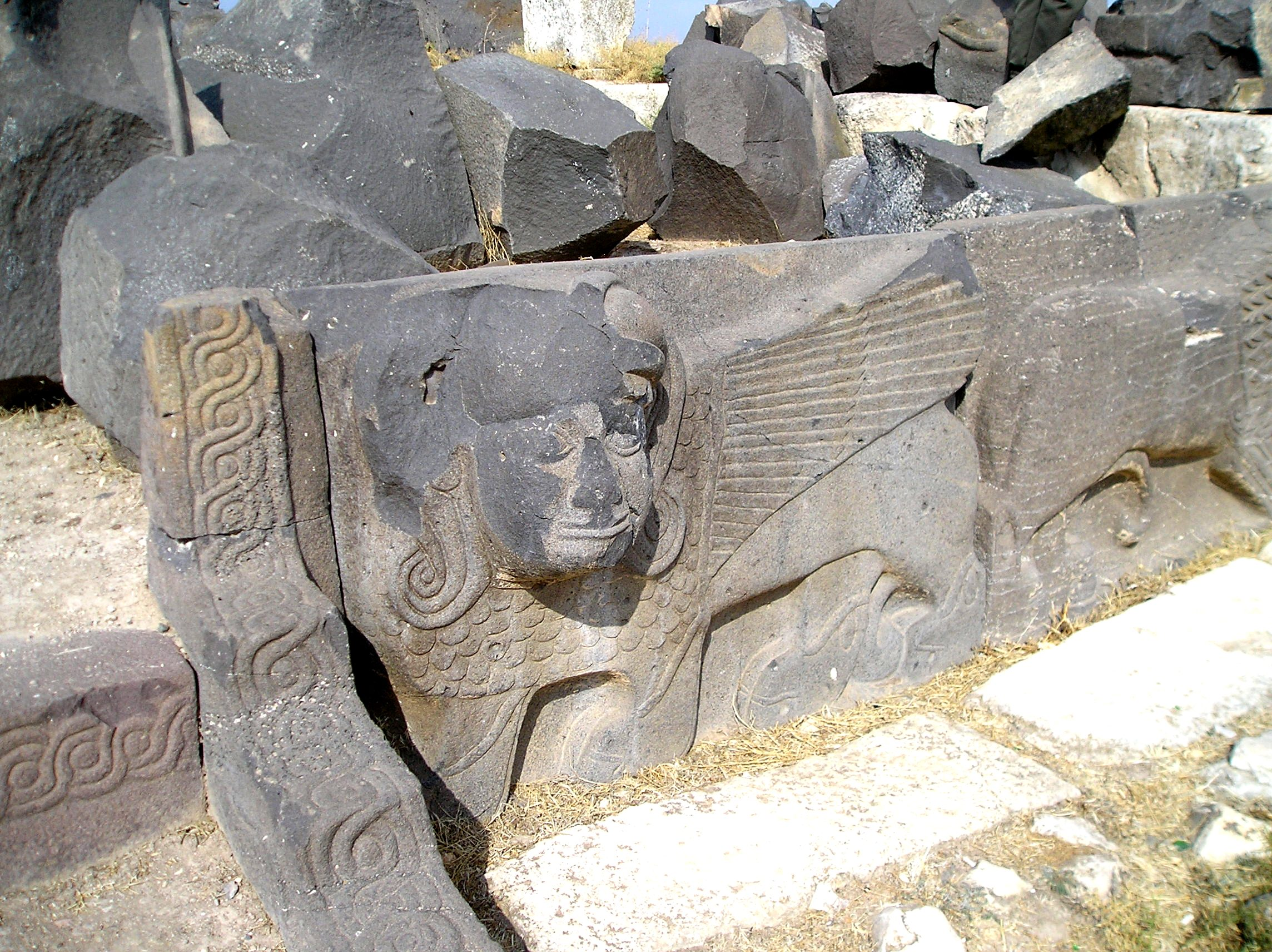 Ain Dara